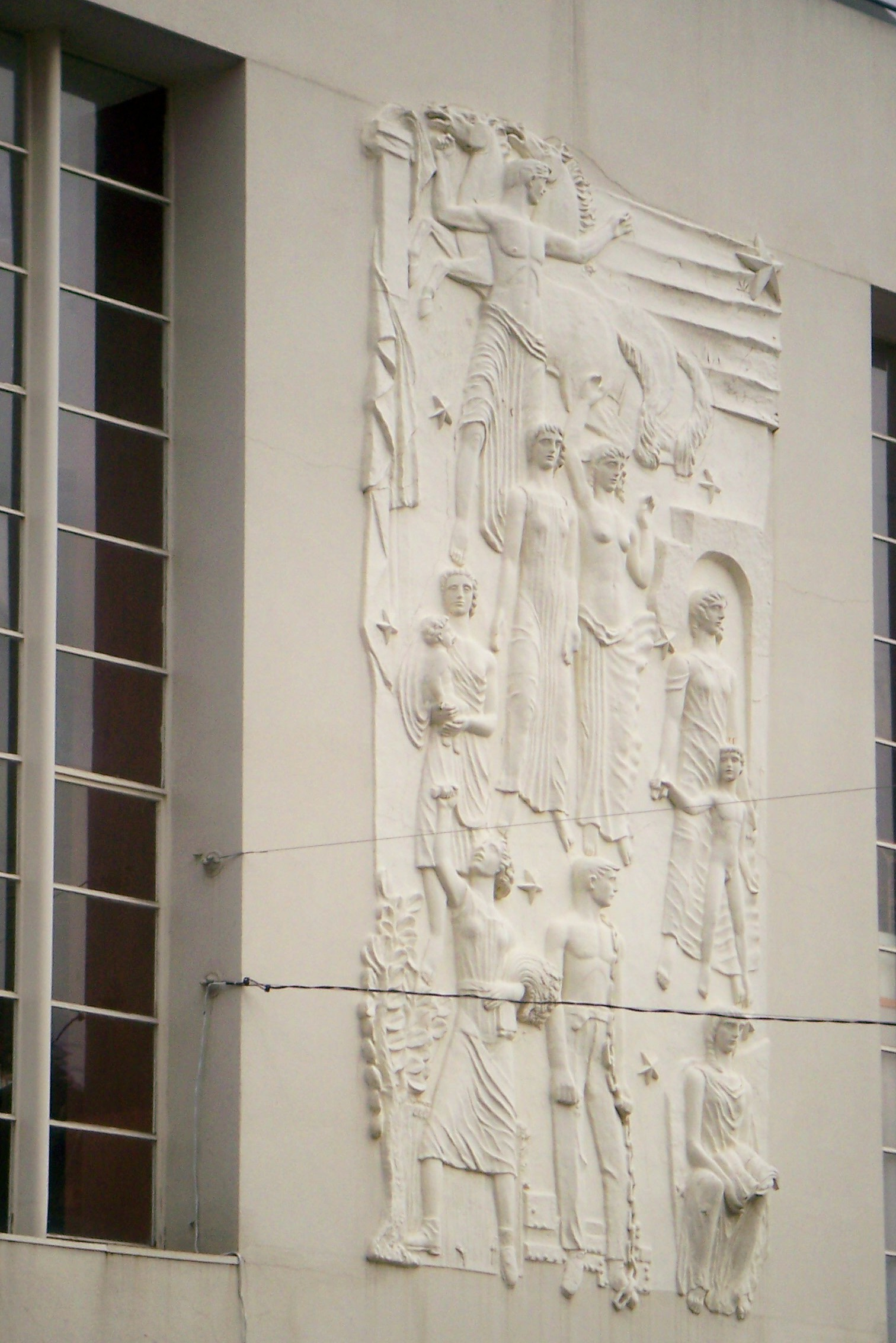 Baixo relevo s/título no cinema Batalha, na Praça da Batalha, Sé, Porto, Portugal; autor Américo Braga.